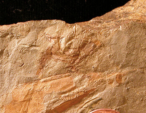 Empreinte de Hyolithe cerops, retrouvée dans les schistes de Spence